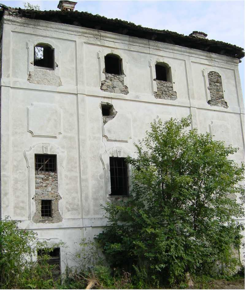 Facciata ovest dell'ala ovest del palazzo Gulini a Sorico (CO)